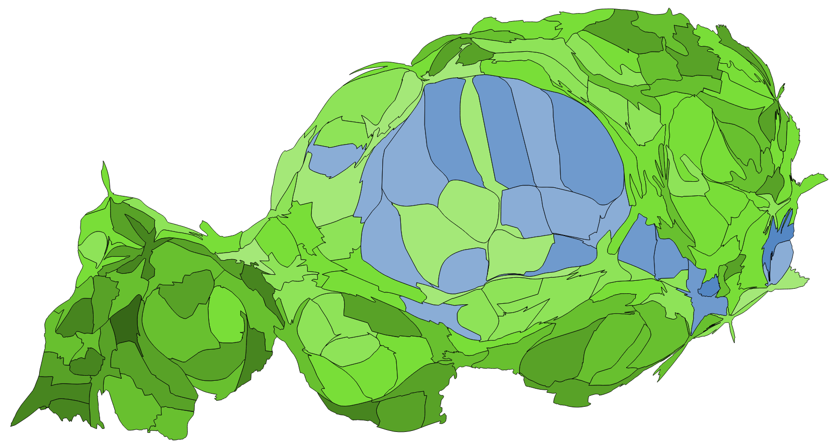 顏色對照表